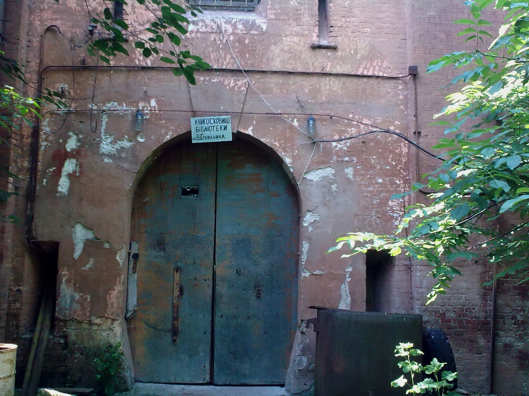 Baszta w cytadeli we Lwowie, magazyn książek